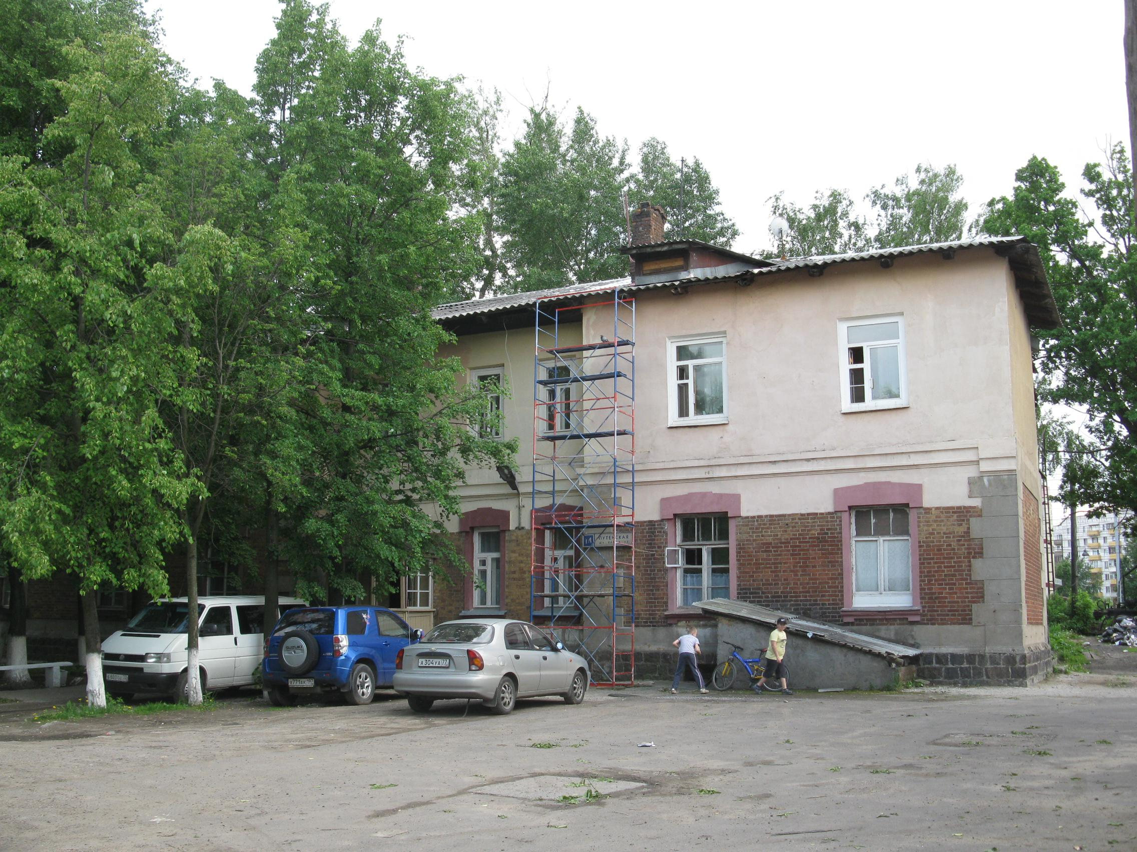 Москва, Путейская улица, дом 14